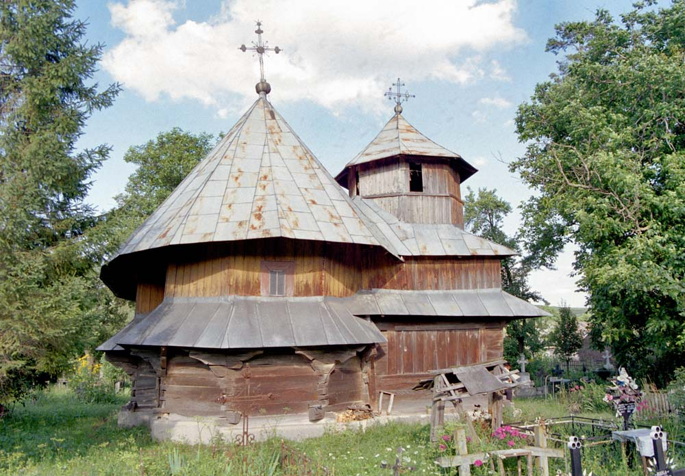 Biserica de lemn din Corjăuţi, latura de vest.